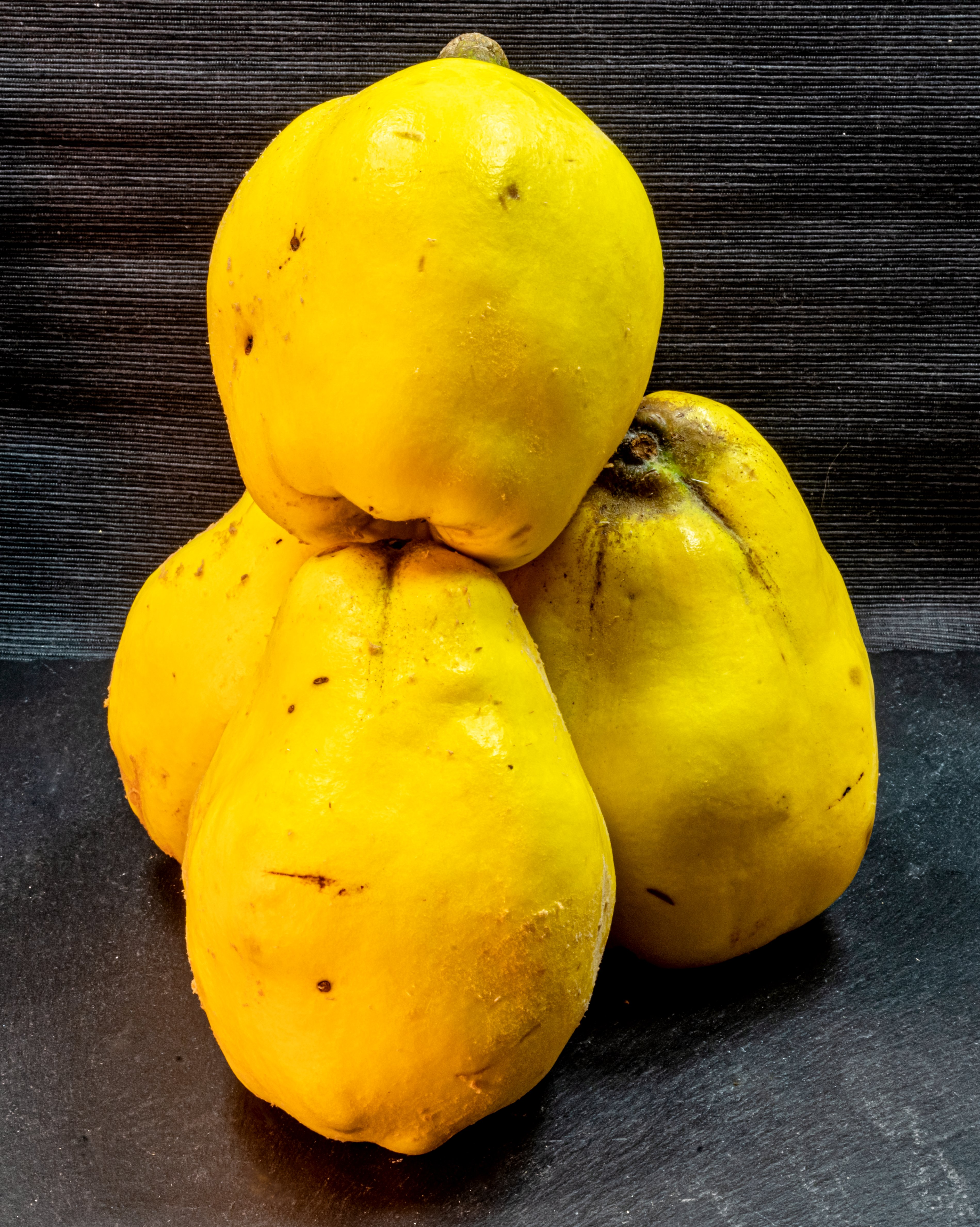 Vranja eine Birnenquitte 1898SerbienZüchter NenadovicDurchmesser erreichen sie sieben bis neun, in der Höhe neun bis elf Zentimeter 300 bis 550 Gramm selten 1000gr Die Früchte - jeweils 5 pro Sorte - wurden mir vom Obsthof Drechsle netterweise kostenlos für die Wikipedia Photographien zur Verfügung gestellt´. Vielen Dank dafür.